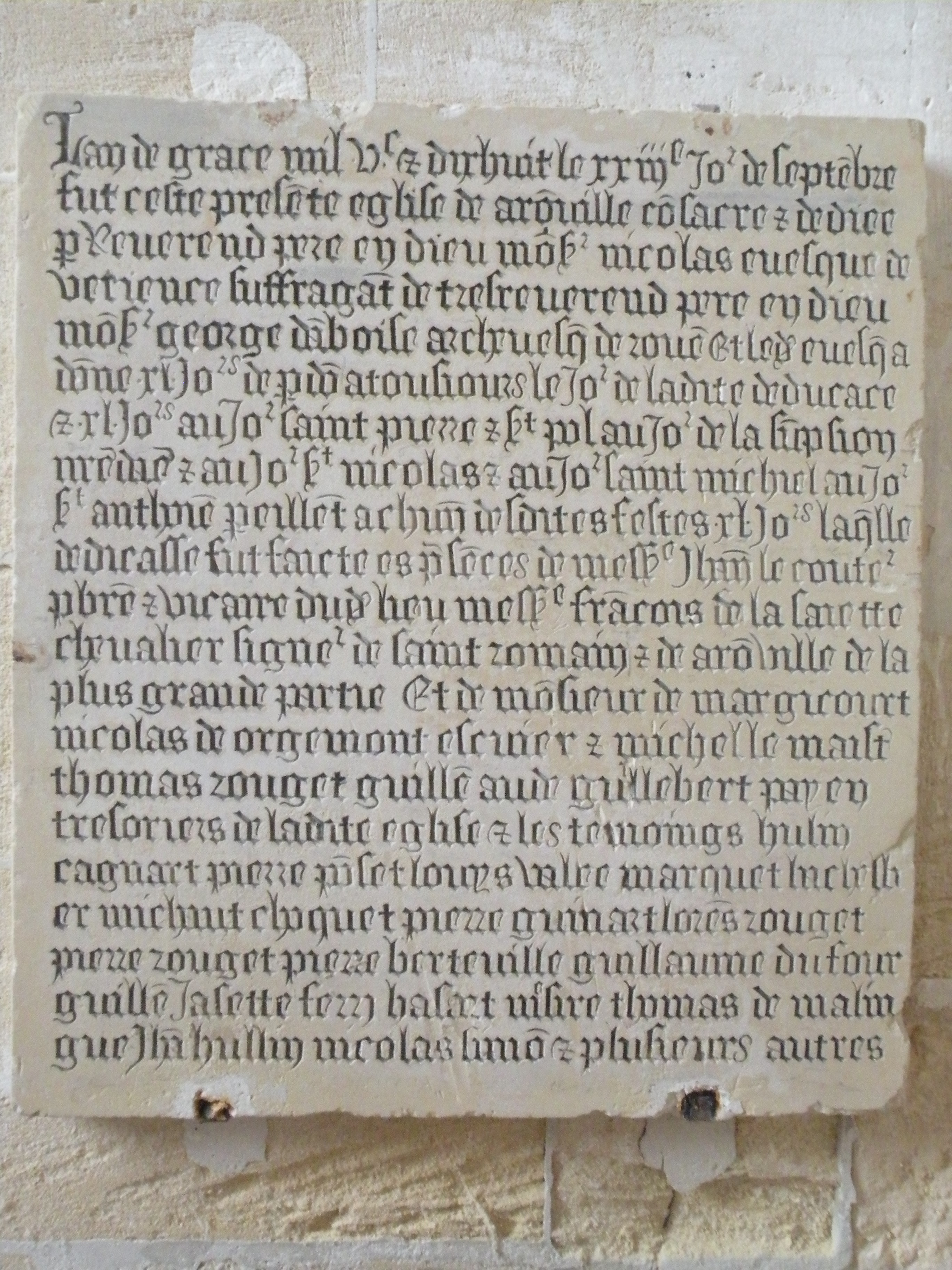 Plaque commémorative de la consécration de l'église, le 23 septembre 1518.